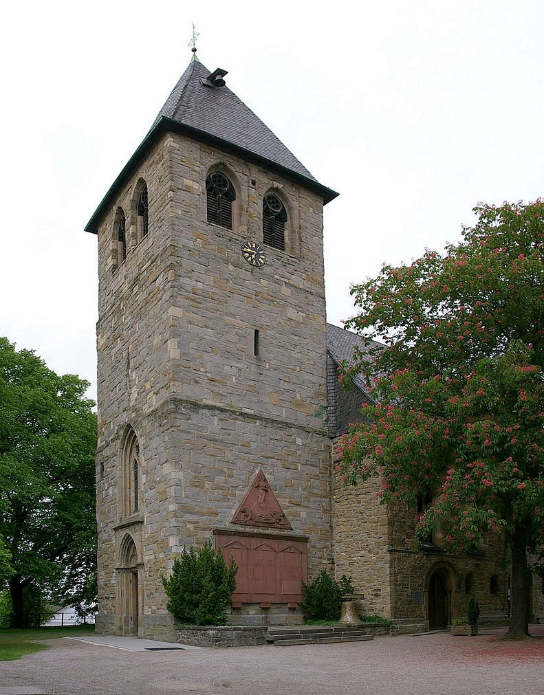 Evangelische Kirche Dortmund-Brackel, Nordrhein-Westfalen. Ursprung im 12. Jhdt., seit 1554 lutherisch.This is a photograph of an architectural monument. 0035